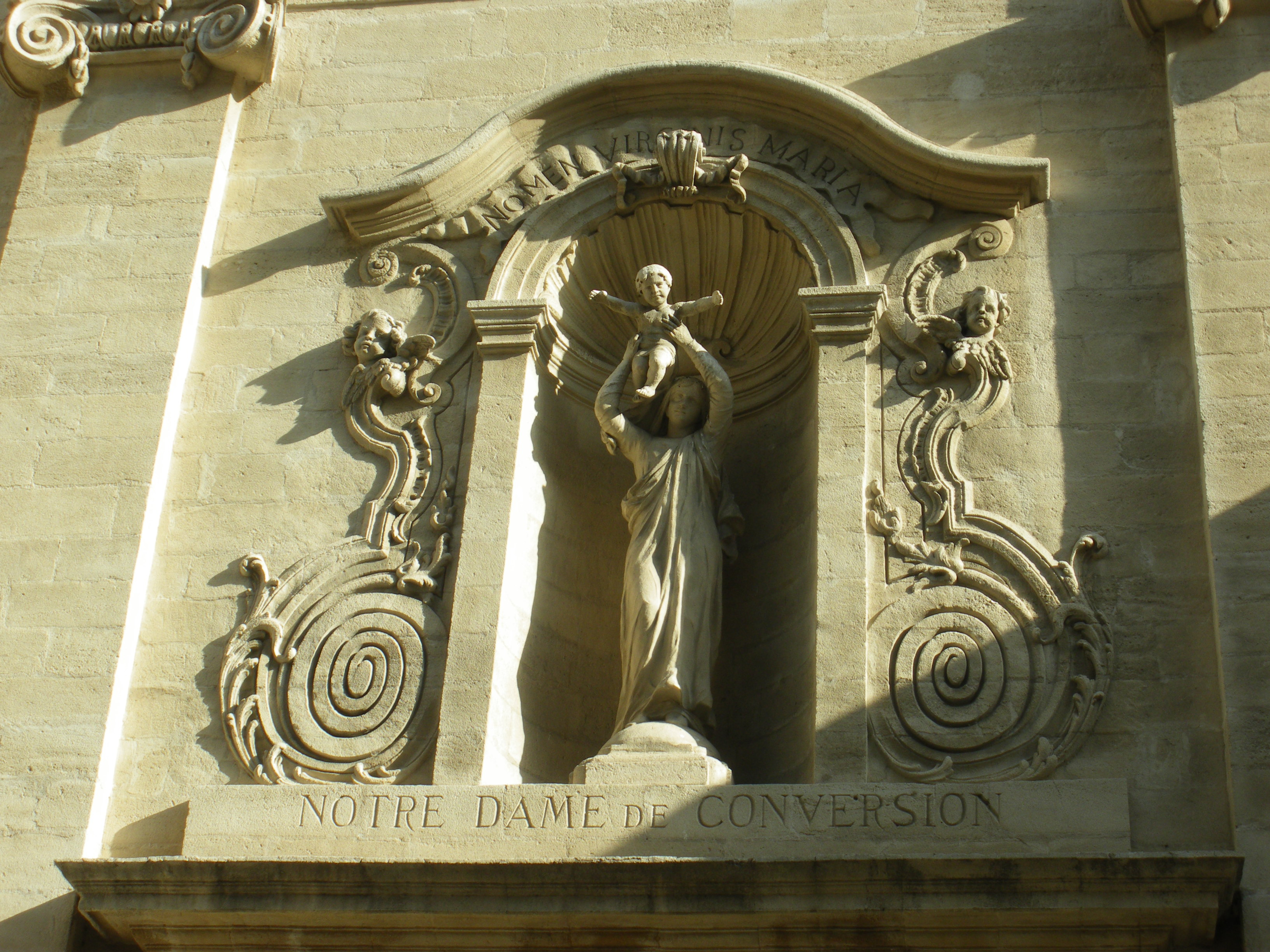 Notre Dame de la Conversion, détail de la facade : Vierge à l'enfant, Avignon (Vaucluse), France